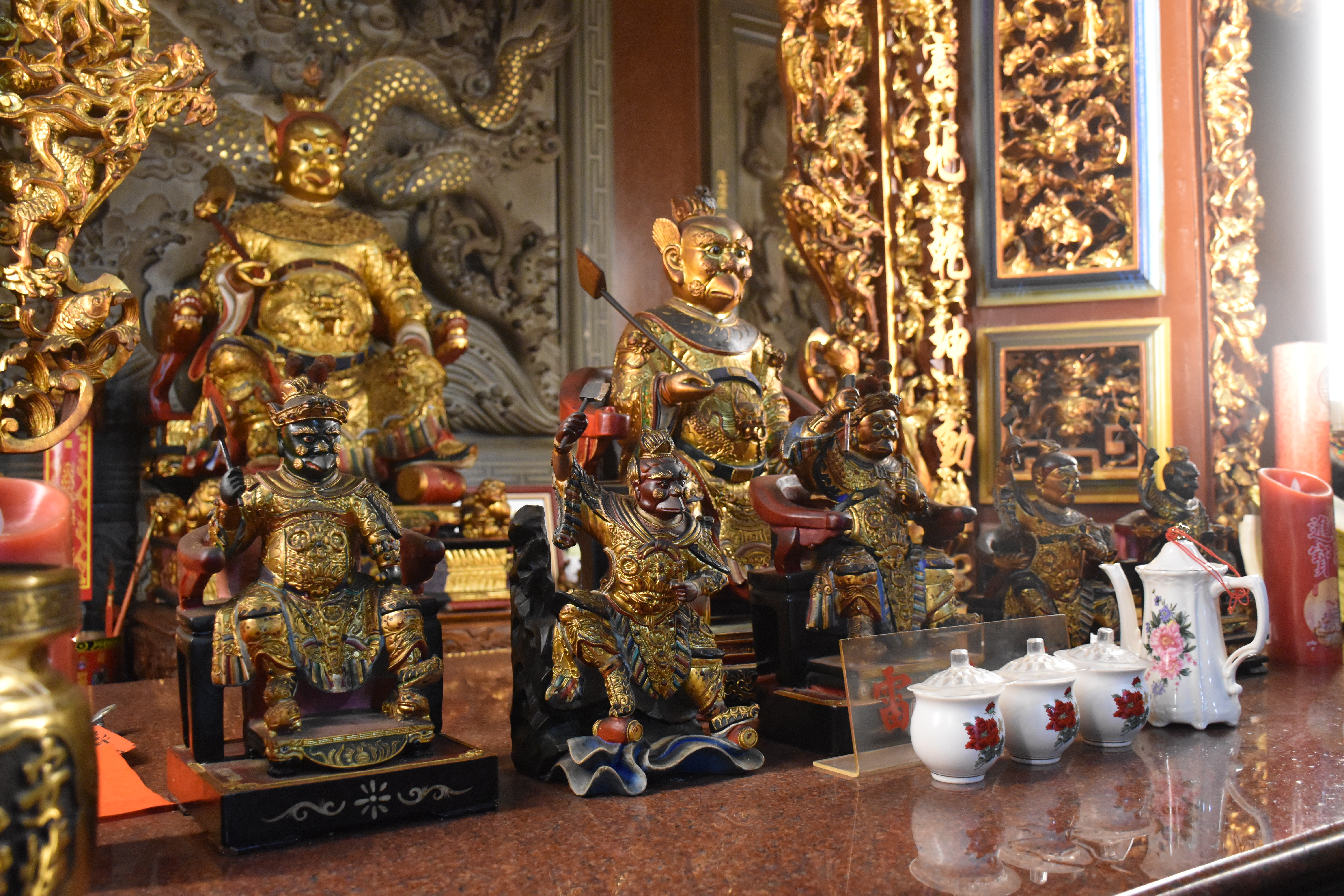 霹靂宮普化天尊（雷神）神像。